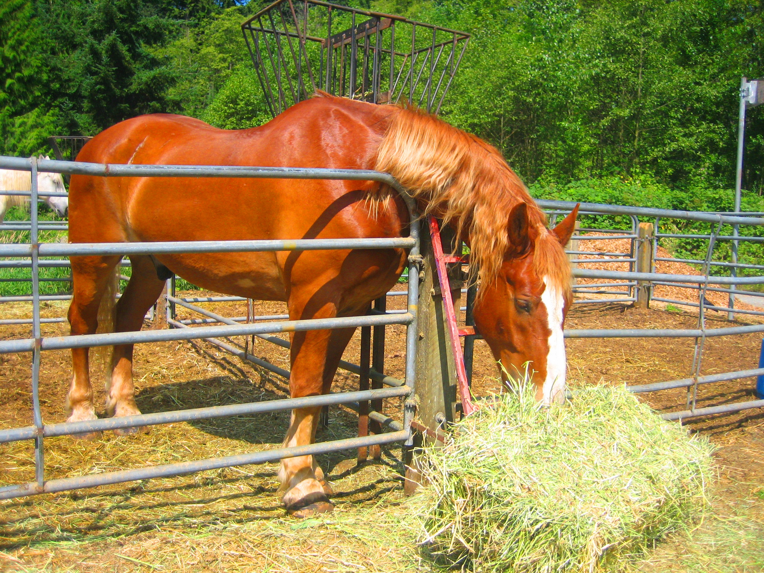 Horse